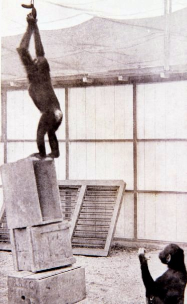 Pruebas de inteligencia en antropoides. Estación de Antropoides de Tenerife, Puerto de la Cruz.